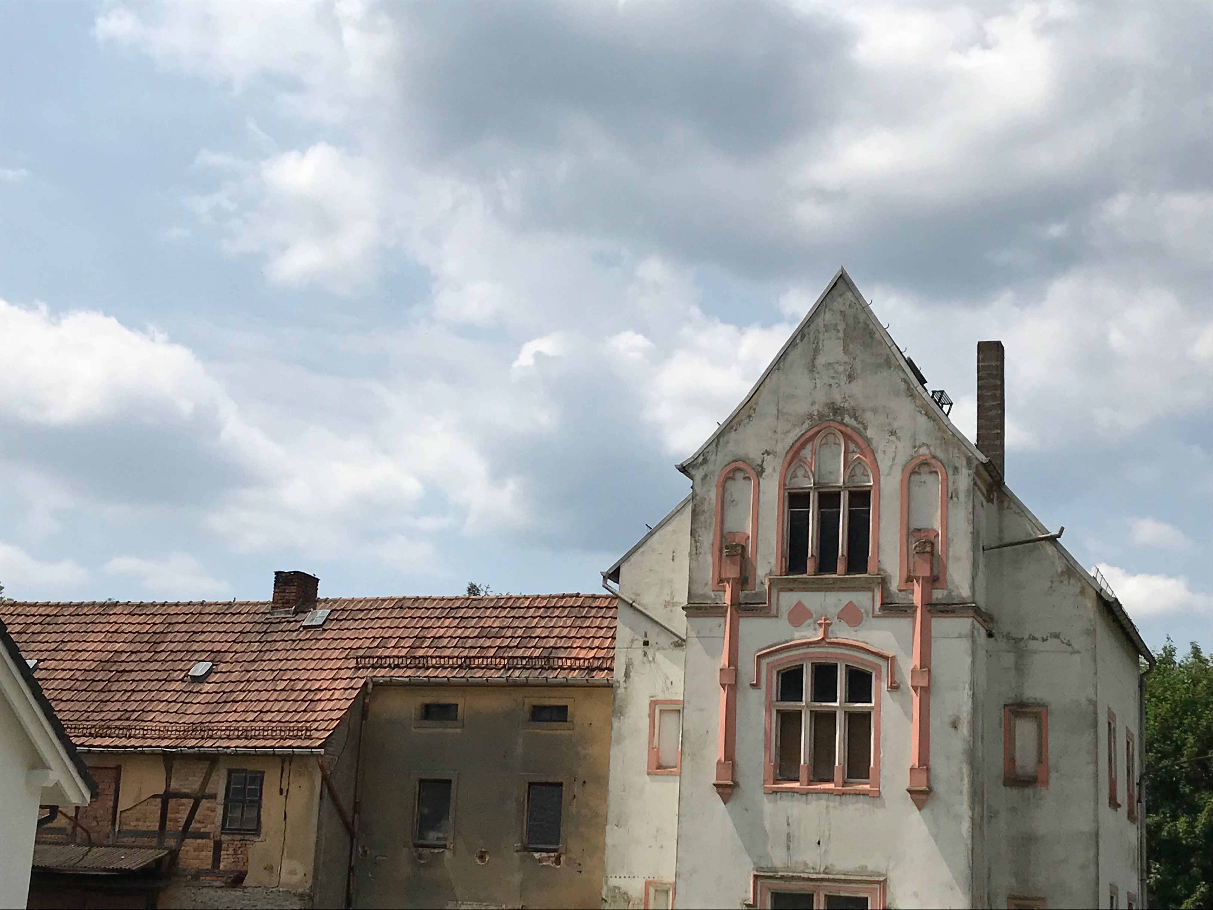 westlicher Gebäuderest